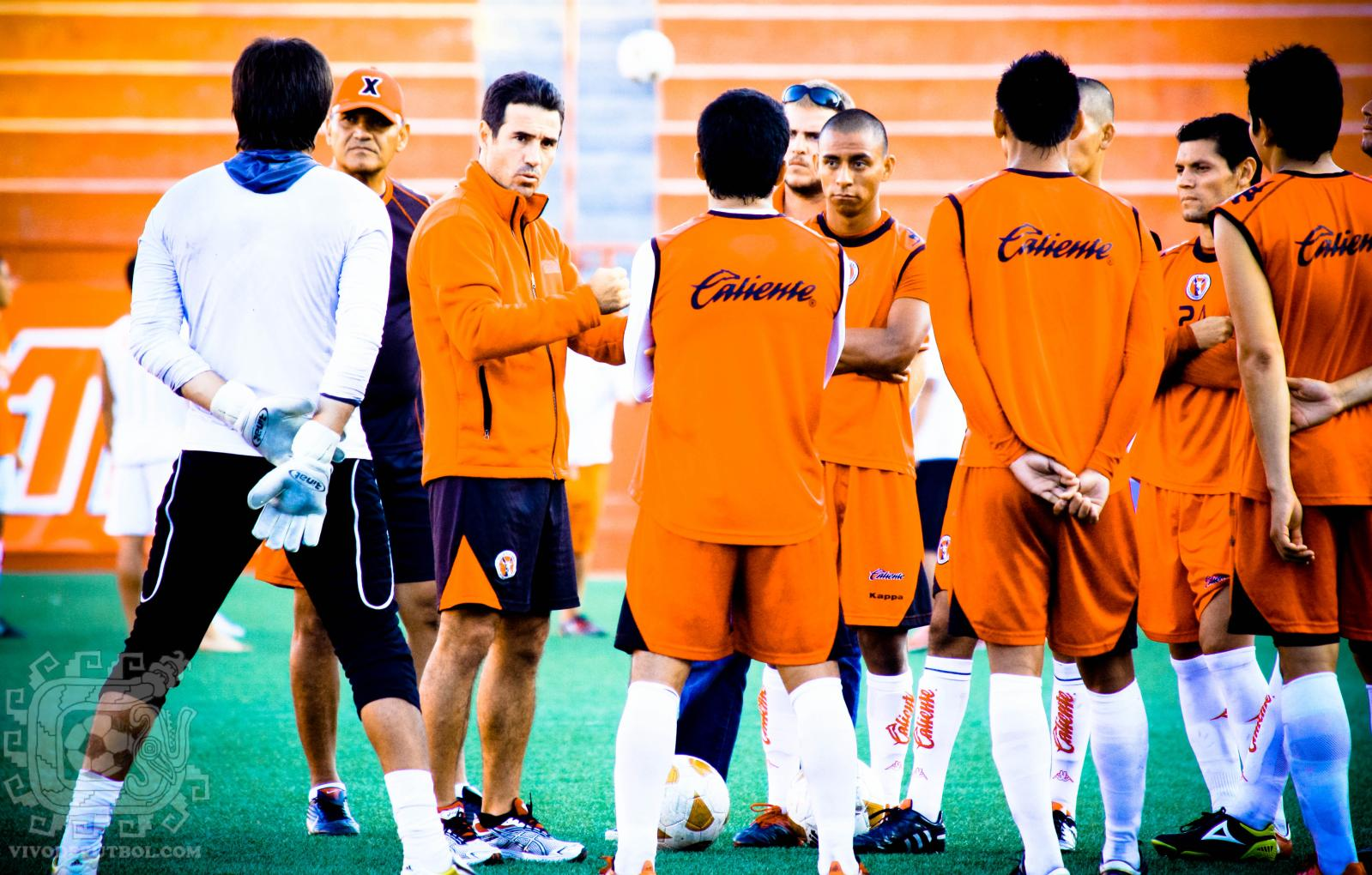 partido entre xolos vs buhos de hermosillo, amistoso celebrado en el estadio caliente de tijuana mas info